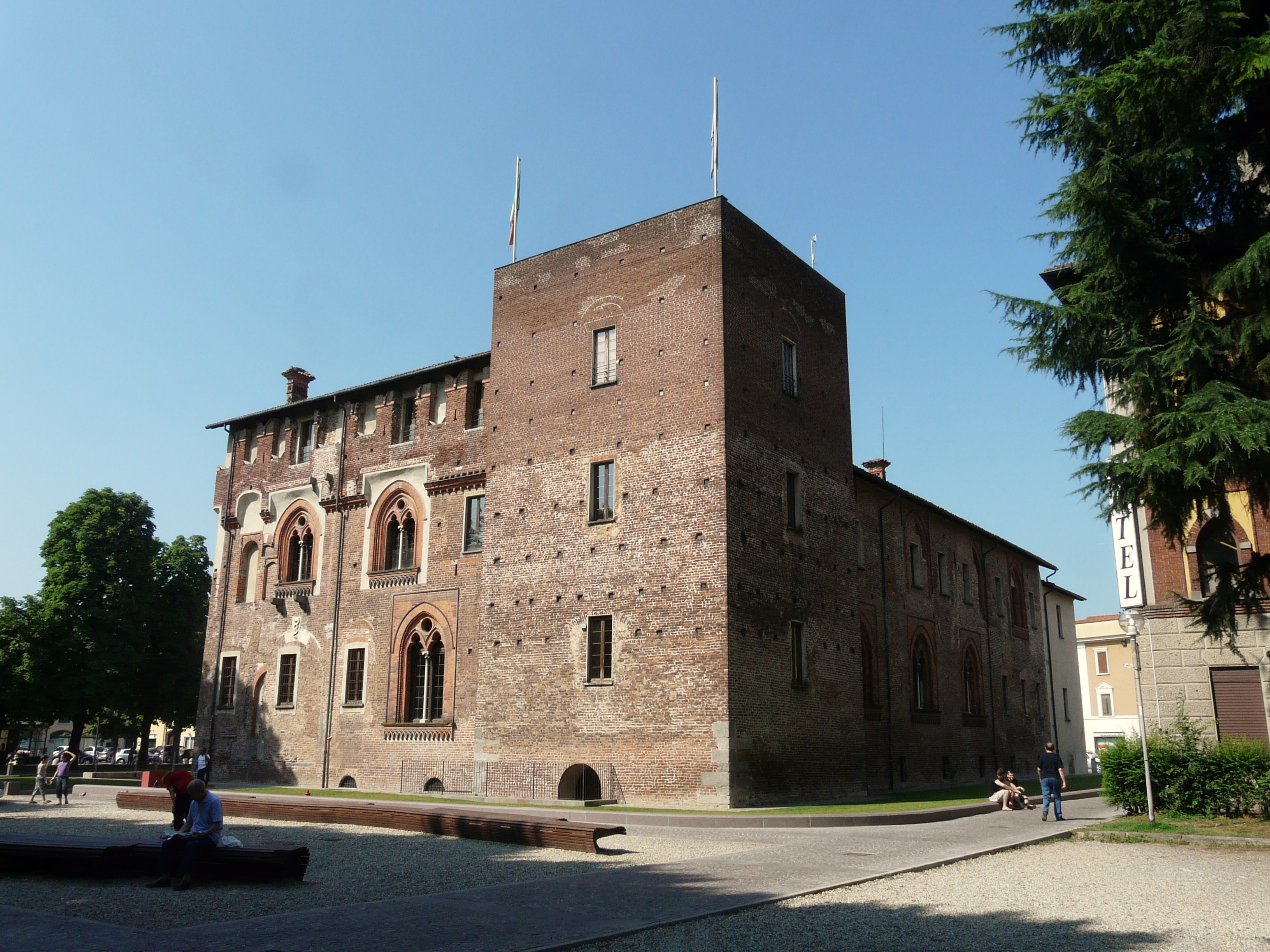 Castello Visconteo, Abbiategrasso, Lombardia, Italia